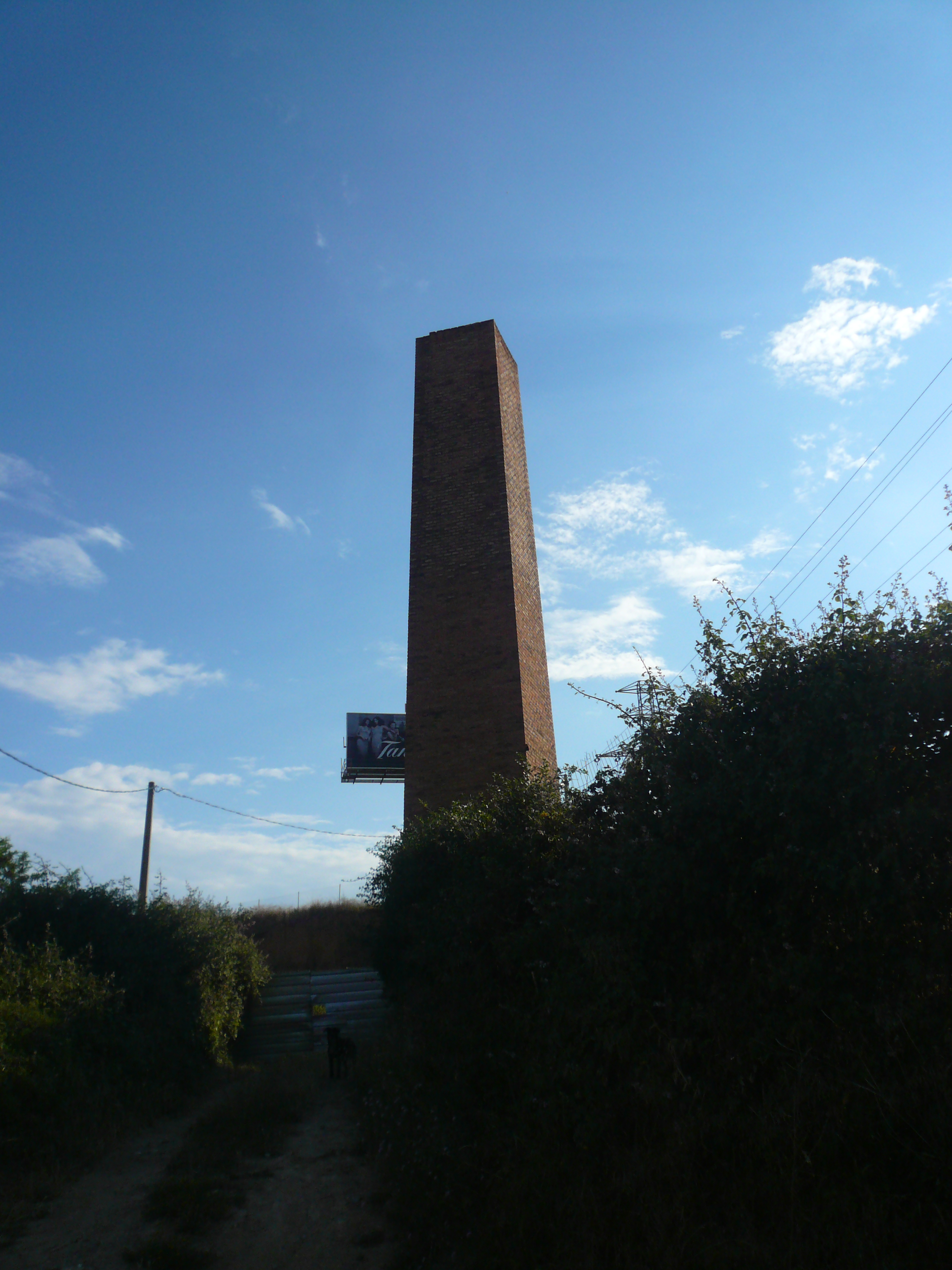 Aqüeducte sobre el torrent d'en Farré. Torrent d'en Farré, la Plana (Esplugues de Llobregat).